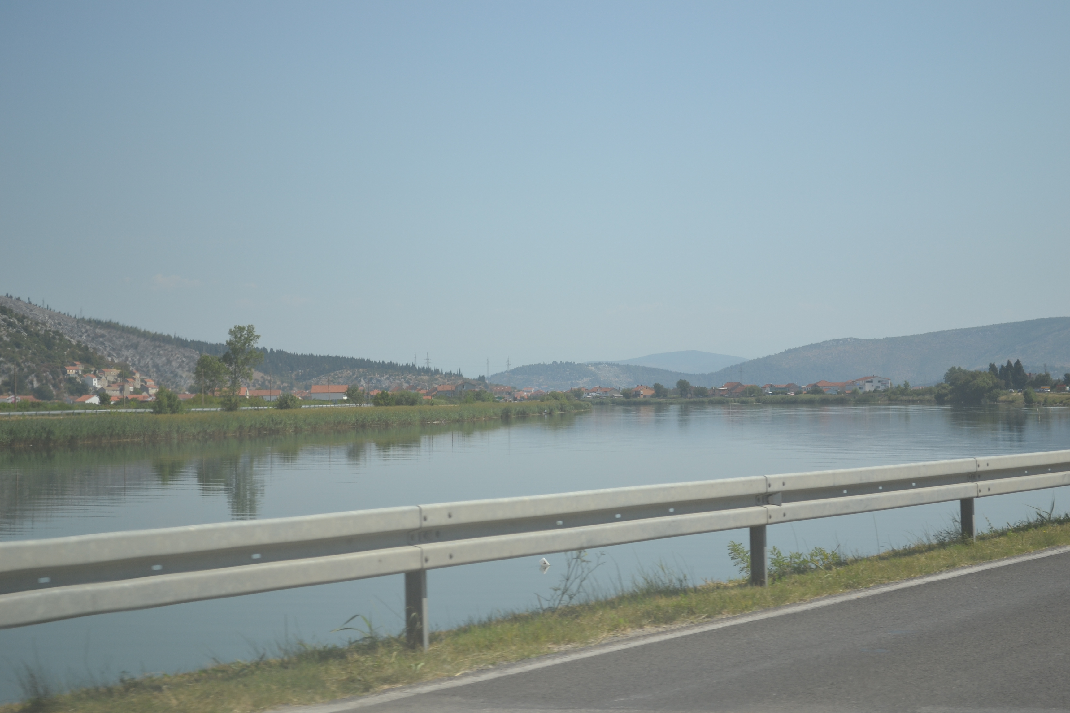 Neretva kod Opuzena